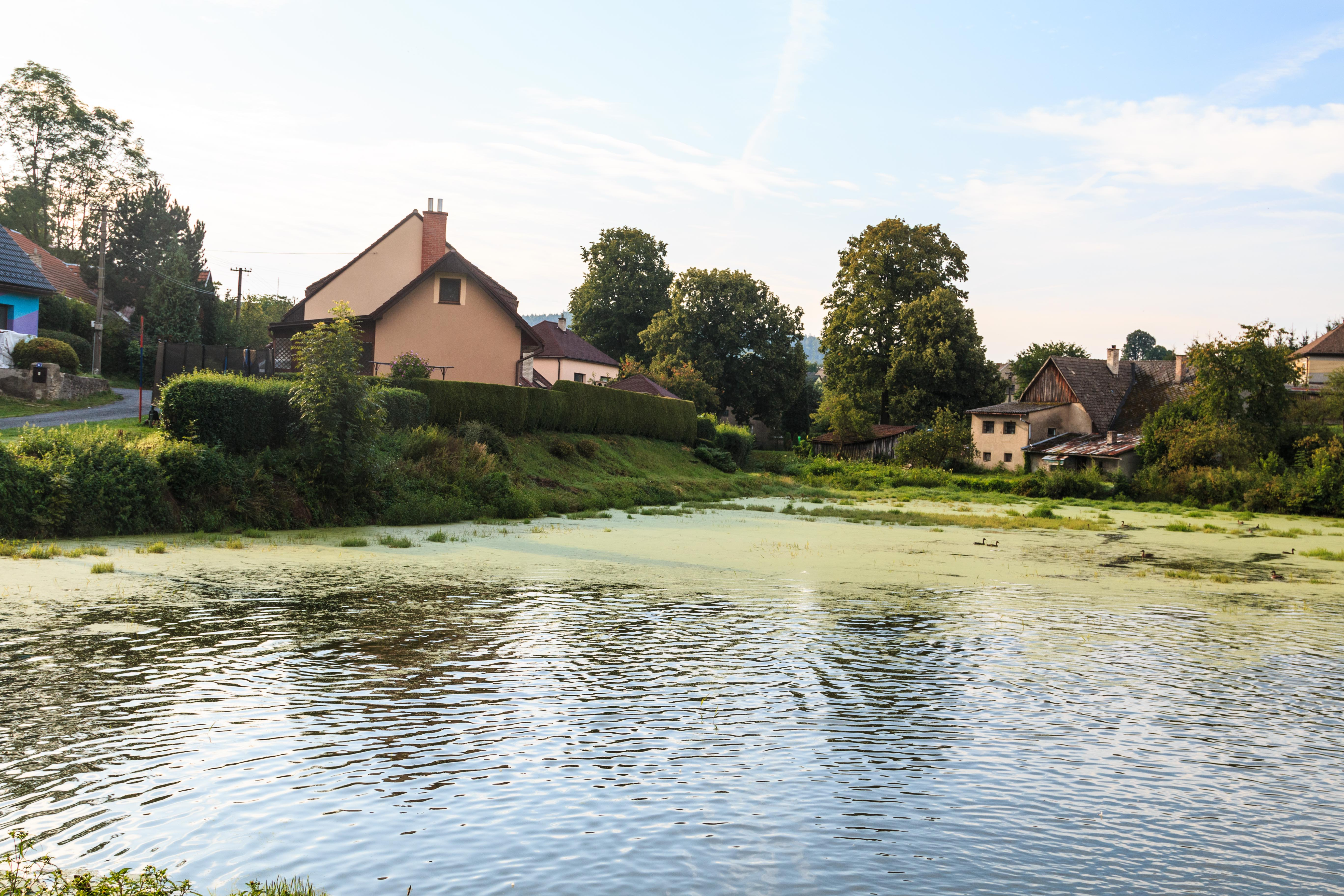 Rybník Komárek v Přívratu